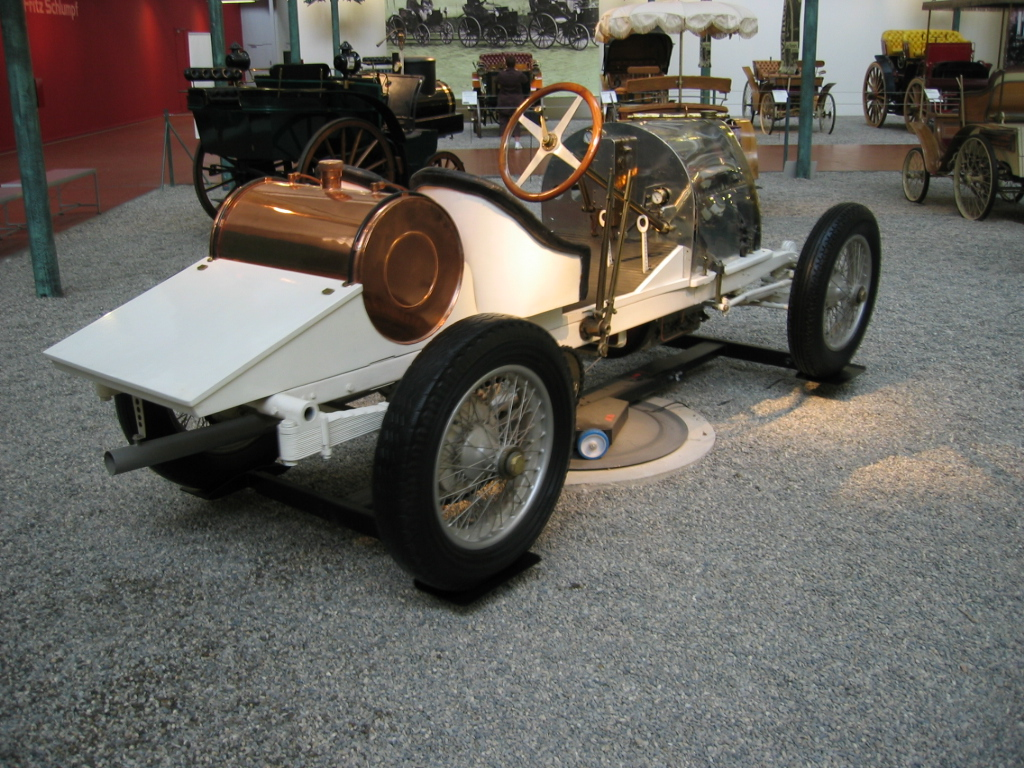 Bugatti Type 16 - Cité de l'Automobile de Mulhouse